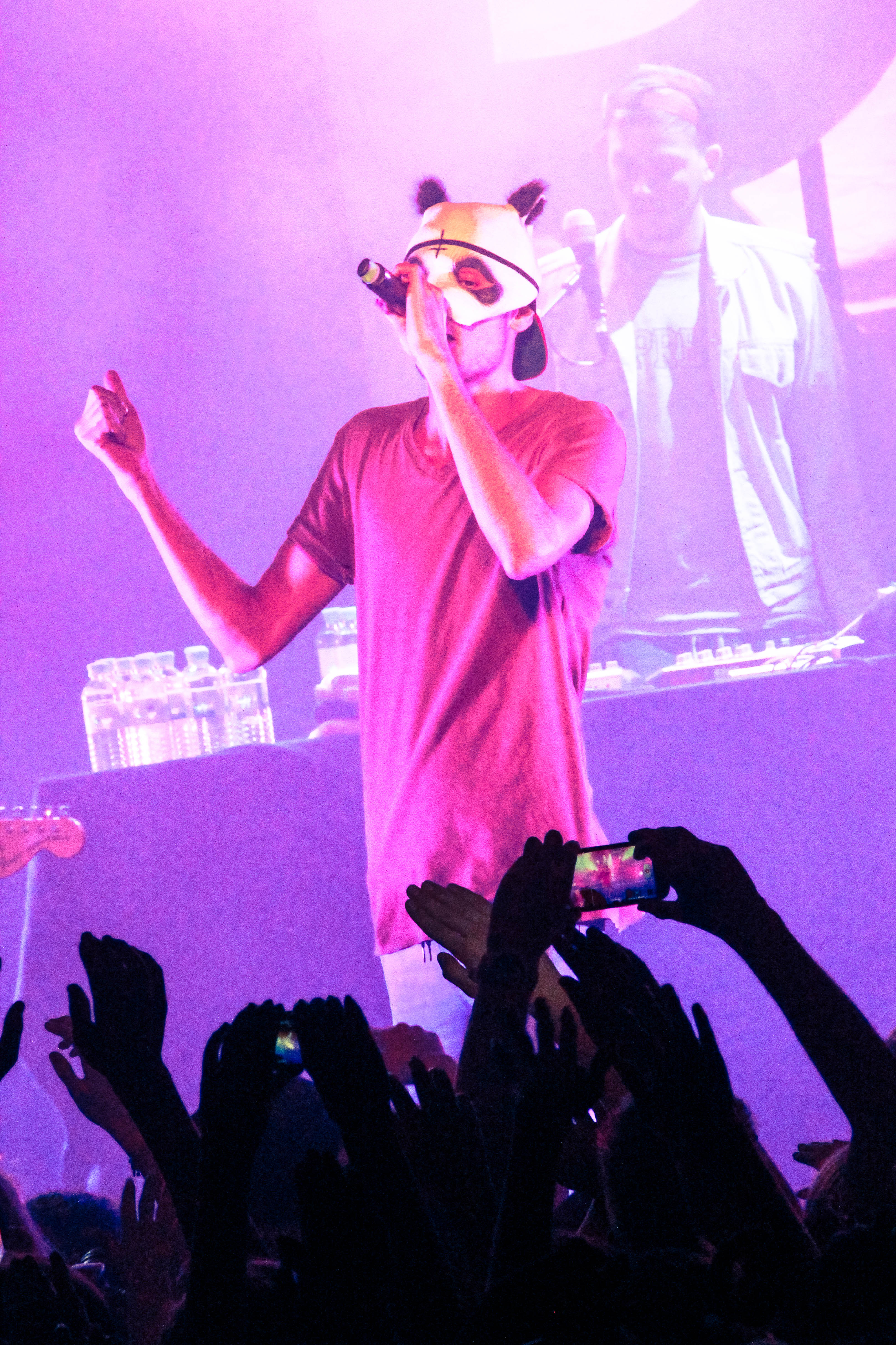 Cro im Rockhouse Salzburg